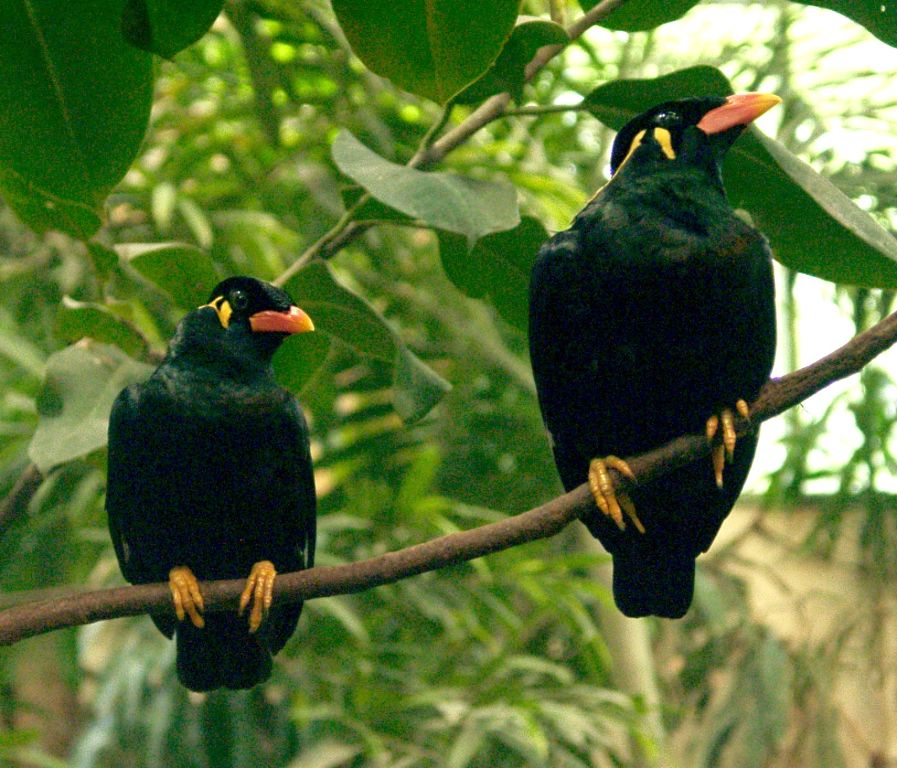 Gracula religiosa, Zoologischer Garten Eberswalde